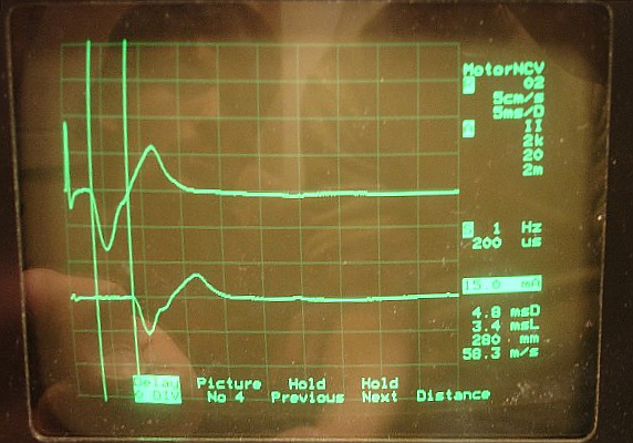 Ablesen der Nervenleitgeschwindigkeit / Reading nerve transmission speed